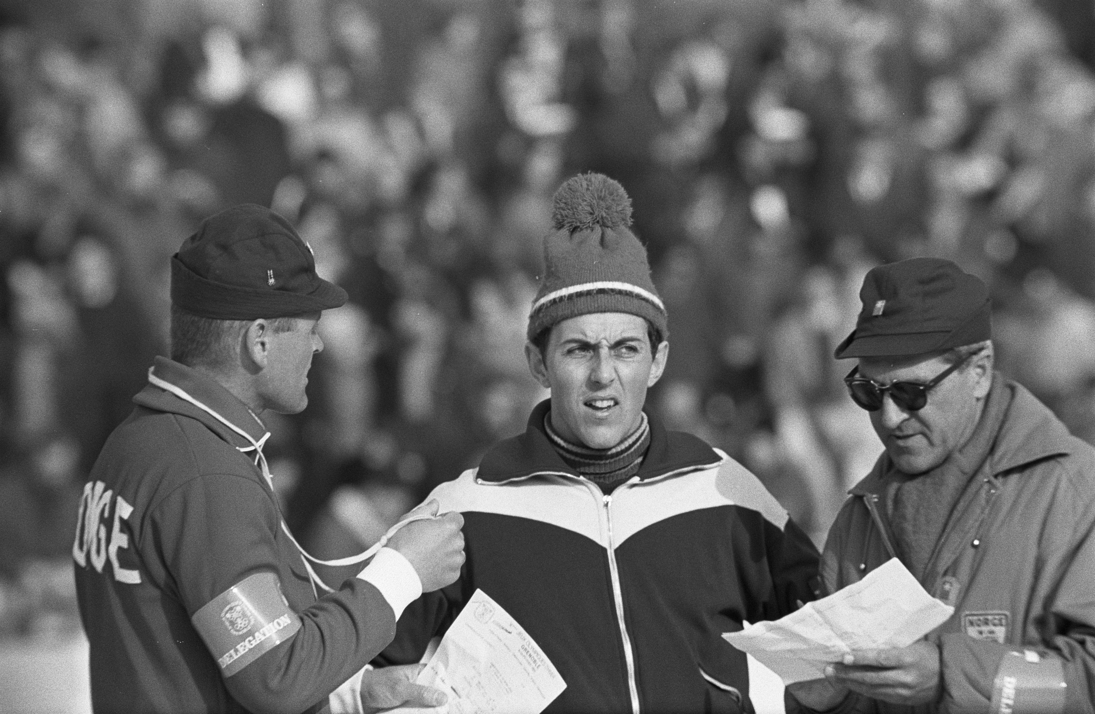 Collectie / Archief : Fotocollectie Anefo Reportage / Serie : [ onbekend ] Beschrijving : Olympische Winterspelen te Grenoble. Magne Thomassen (Noorwegen, midden) in overleg met zijn coaches. Datum : 14 februari 1968 Locatie : Frankrijk, Grenoble Trefwoorden : schaatsen, sport Persoonsnaam : Thomassen, Magne Instellingsnaam : Olympische Winterspelen Fotograaf : Kroon, Ron / Anefo Auteursrechthebbende : Nationaal Archief Materiaalsoort : Negatief (zwart/wit) Nummer archiefinventaris : bekijk toegang 2.24.01.05 Bestanddeelnummer : 921-0830